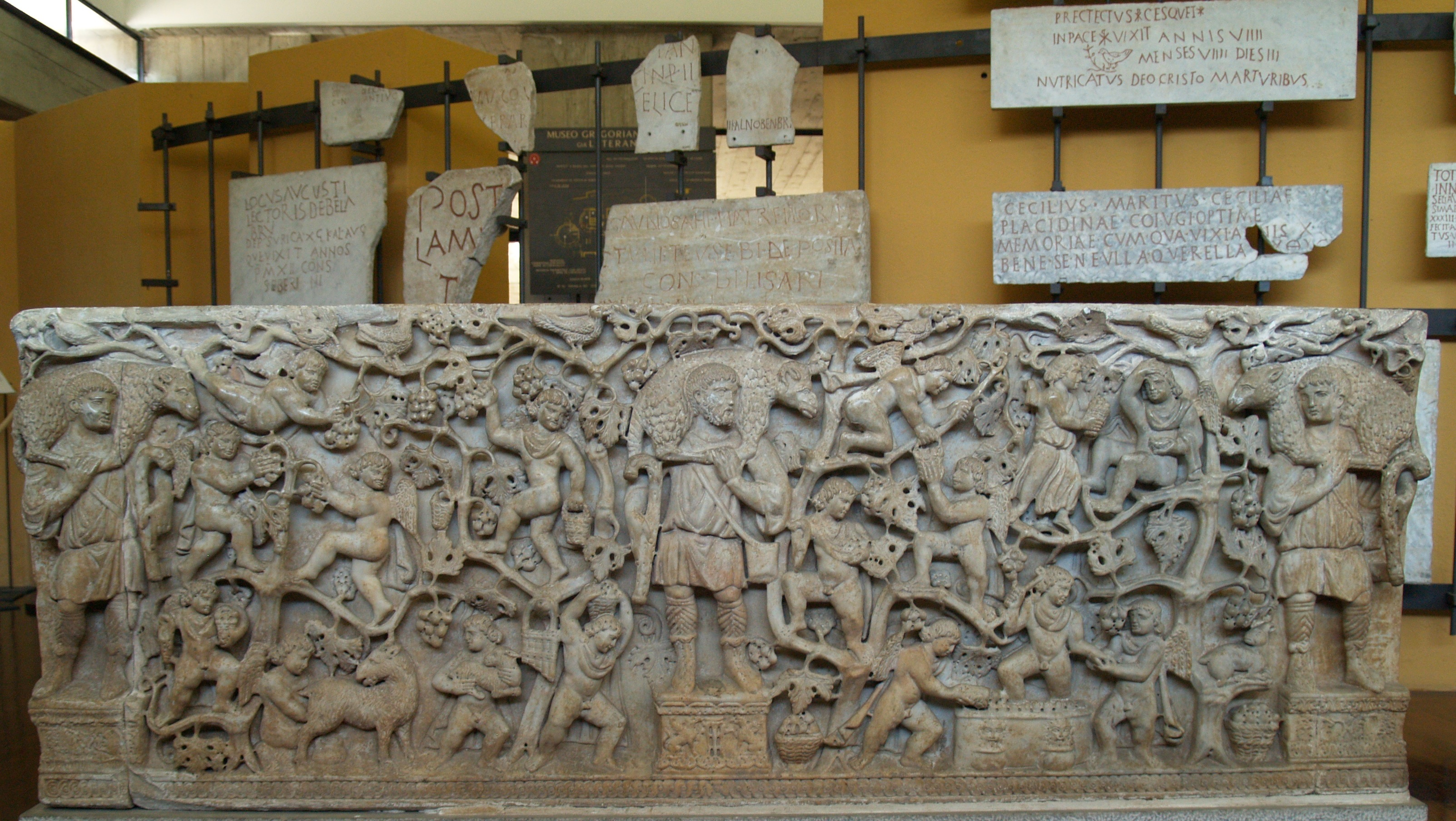 Vaticano. Museo Pio-Cristiano sarcófago paleocristiano.